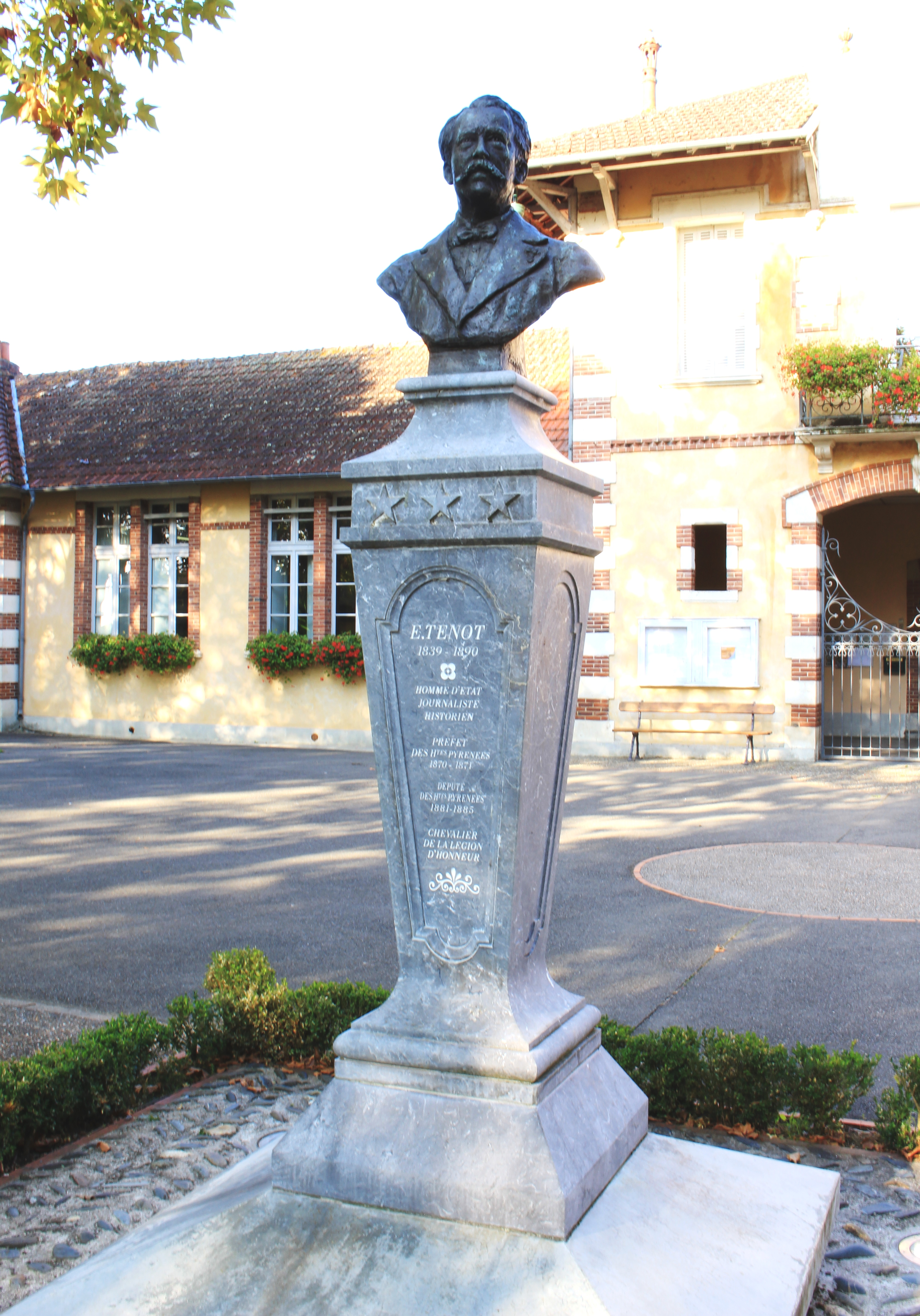 Larreule (Hautes-Pyrénées)